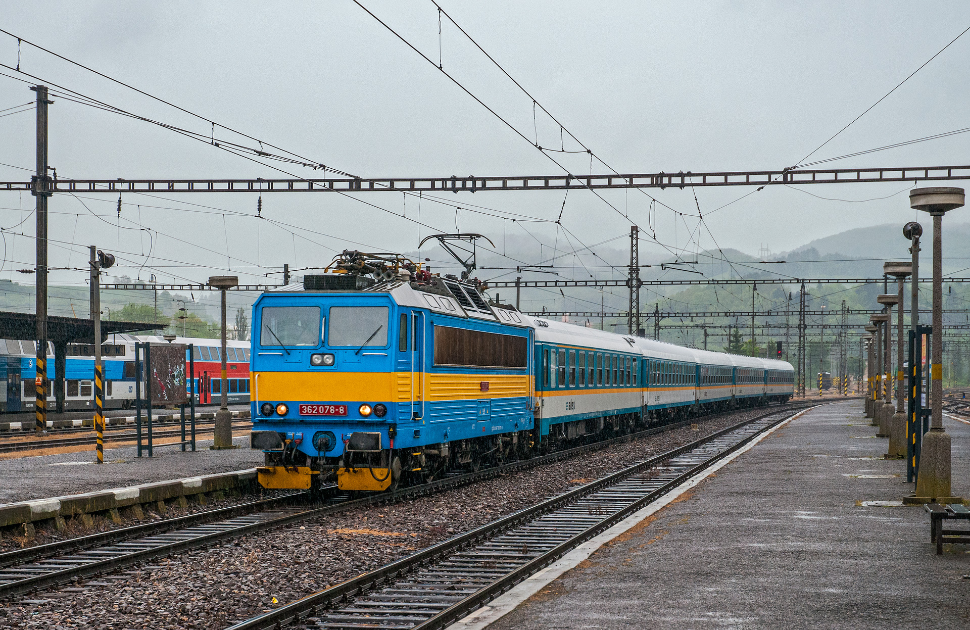 Lokomotiva 362.078 v historizujícím nátěru v Berouně v čele vlaku EC 350 do Mnichova.